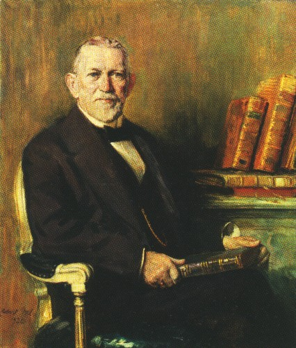 Bildnis Hubert Maximilian Ermisch, Archivar und Historiker